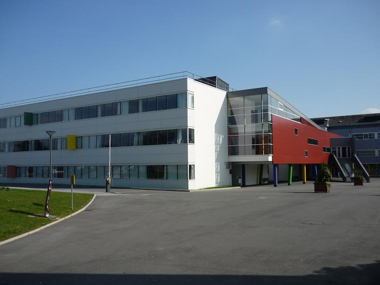 Atelier du lycée Chevrollier à Angers